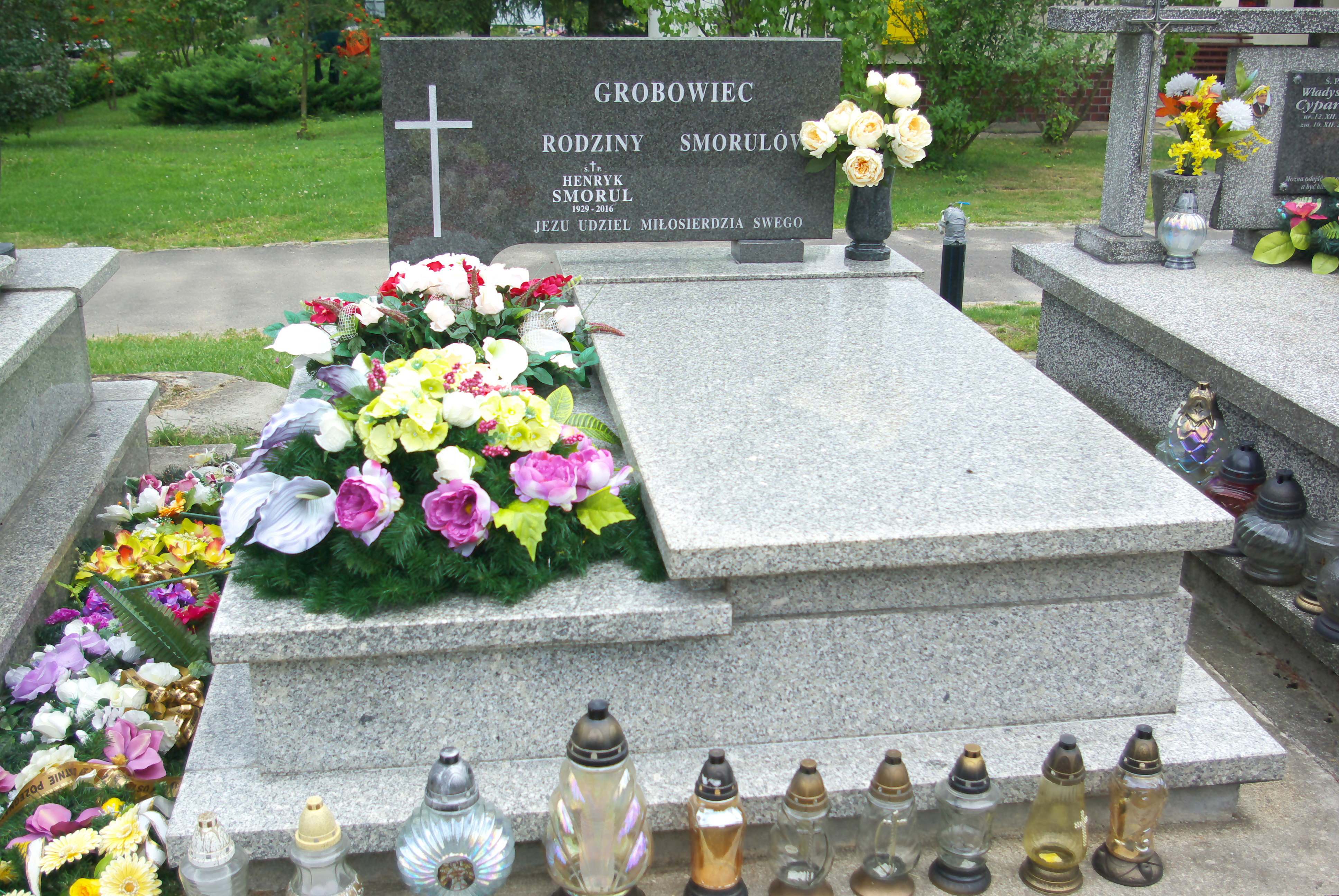 Grobowiec rodziny Smorul na Cmentarzu Centralnym w Sanoku.